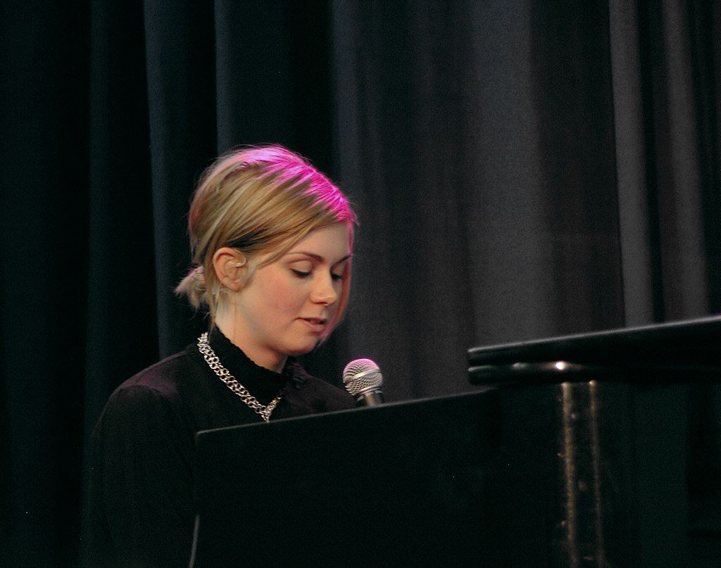 Anna Ternheim, 25.3.2007, Cultureel Podium Roepaen, Ottersum, NL